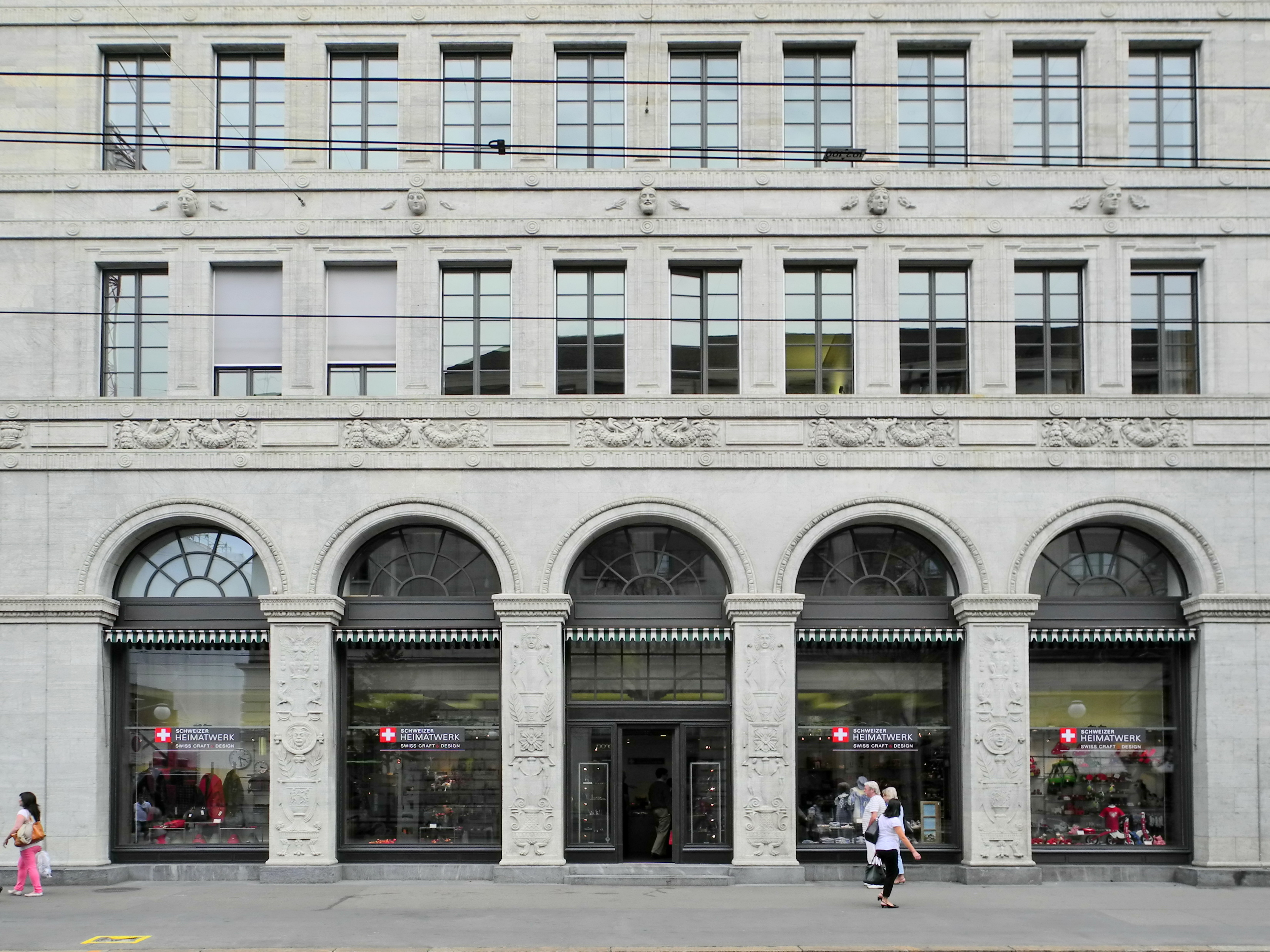 Schweizerische Nationalbank